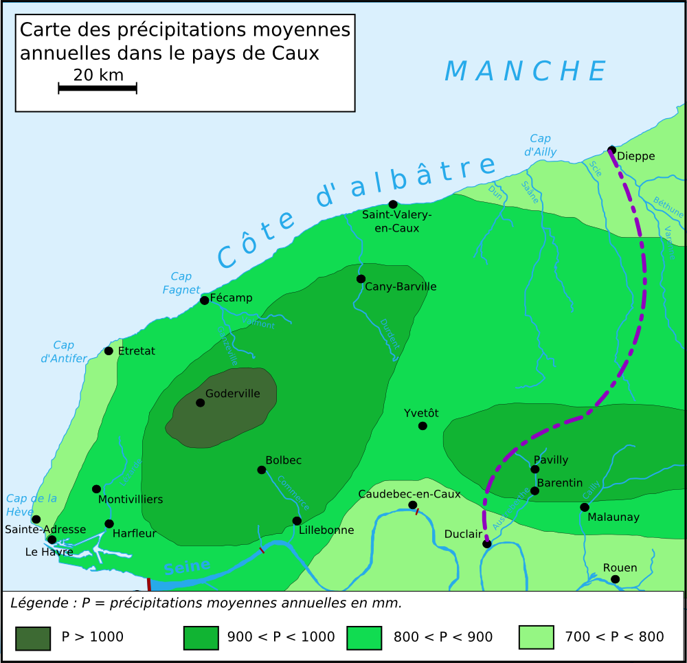 Carte des routes du Pays de Caux